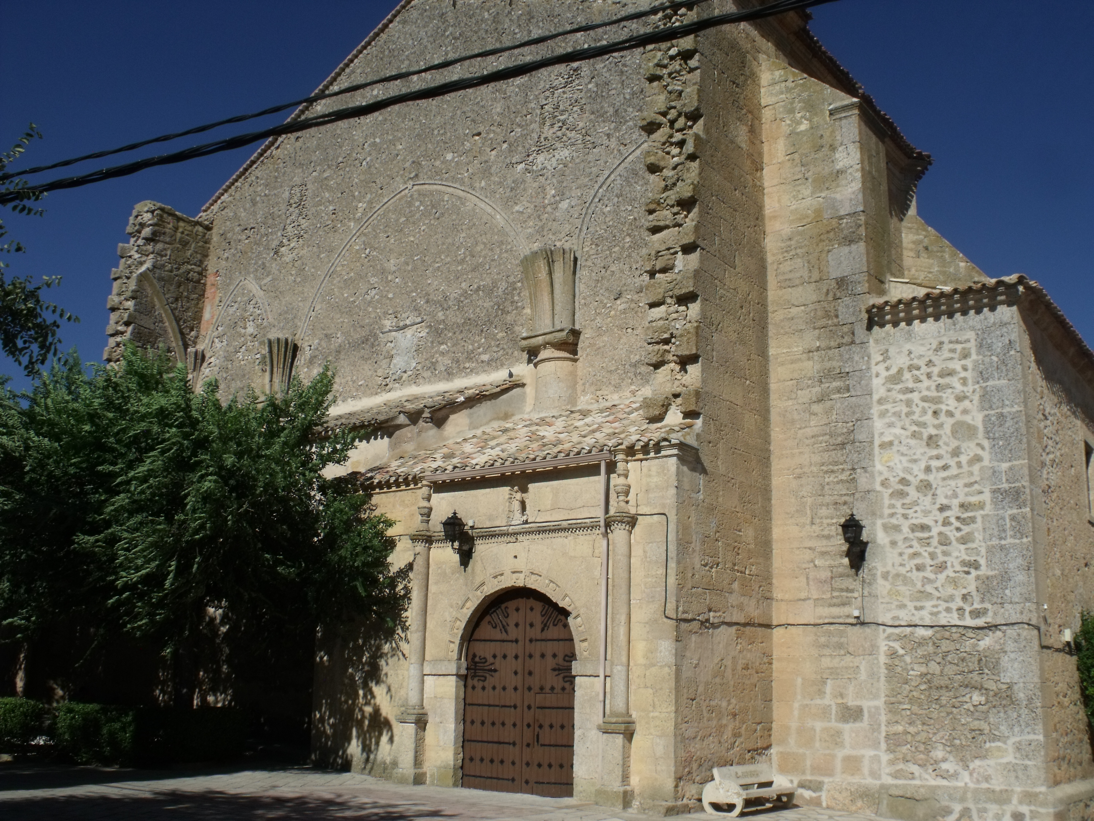 Puerta de acceso al templo de Nuestra Señora de la Asunción